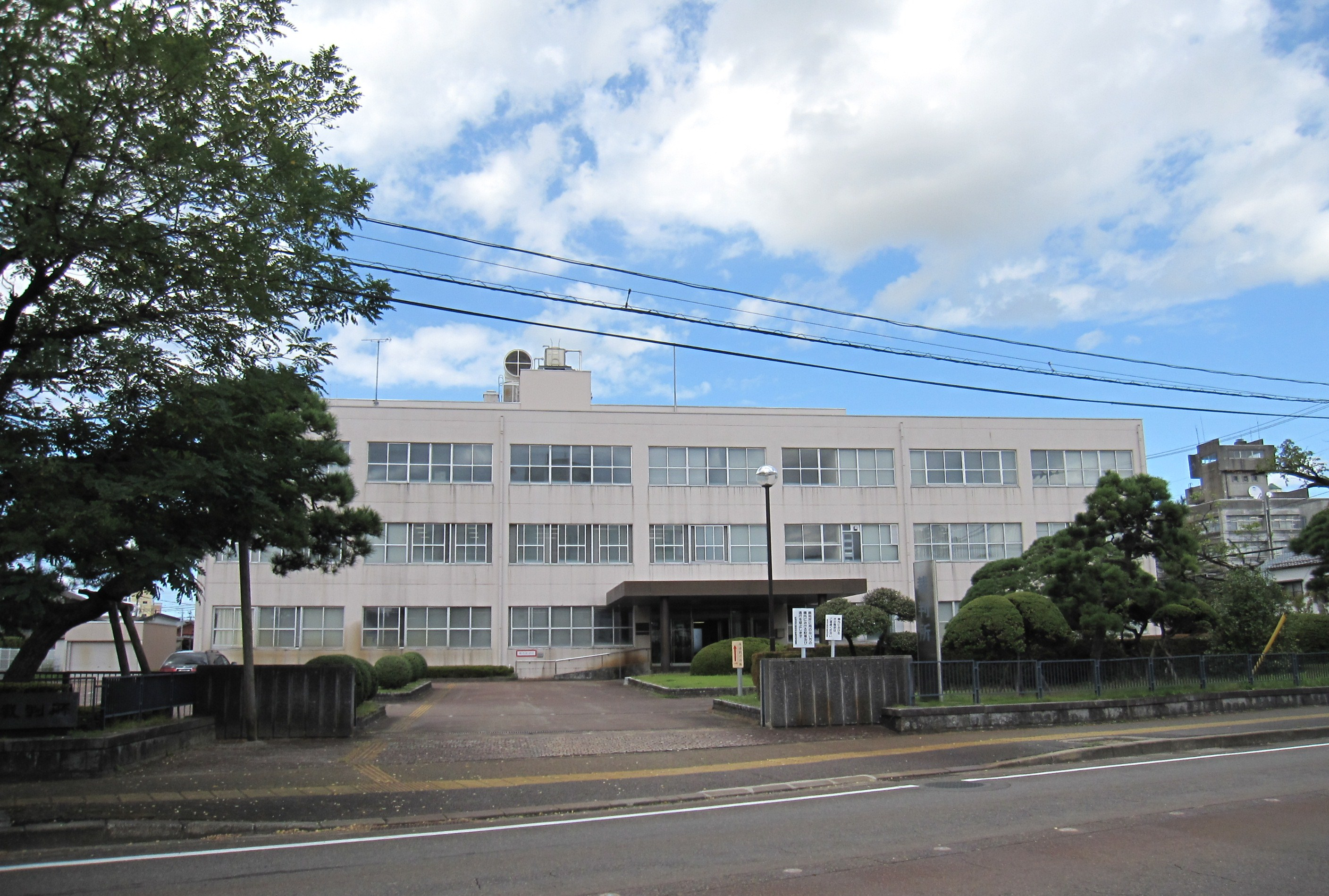 新発田簡易裁判所